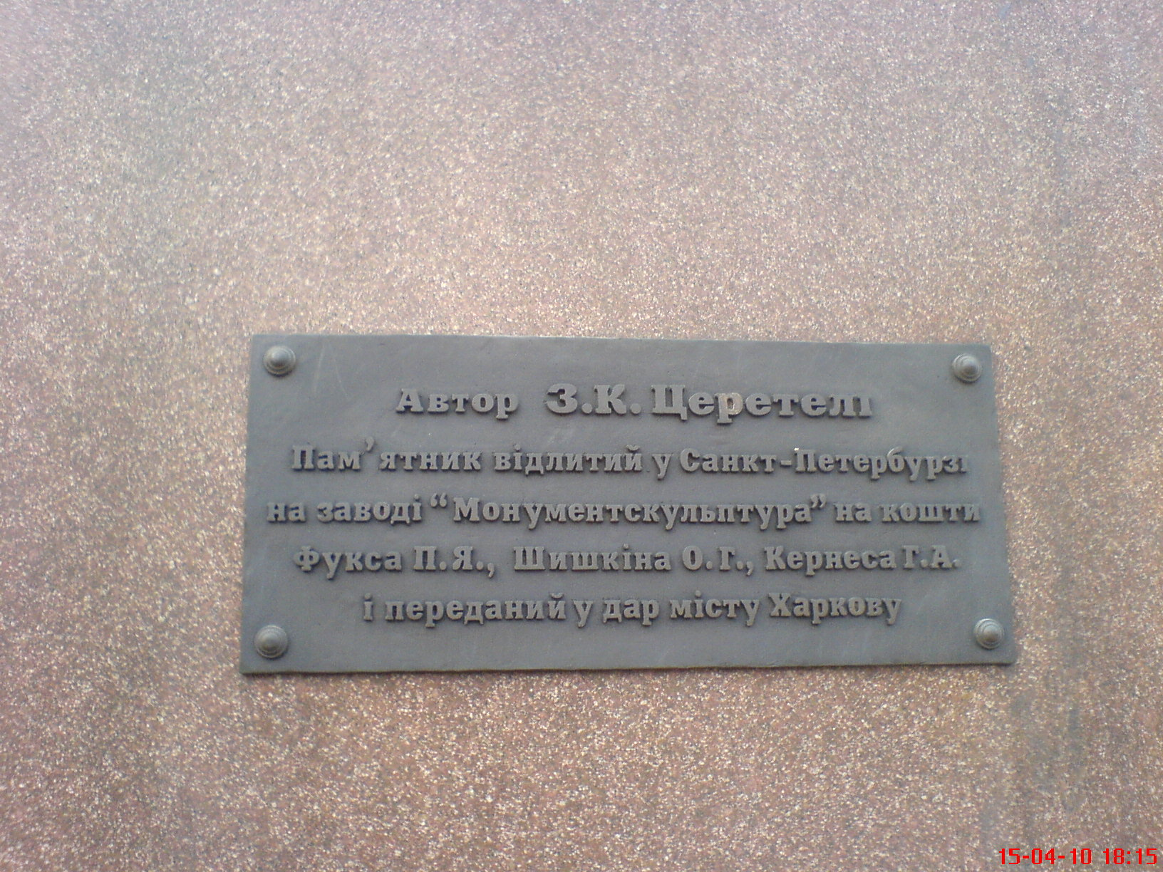 загружаемый файл имеет формат JPG; размер файла 515 КБ; файл представляет собой фотографию вывески с памятной надписью, закрепленной на памятнике основателям города Харькова, установленного в городе Харьков. Информация на табличке не совпадает с информацией, размещенной в Википедии относительно истории создания памятника.